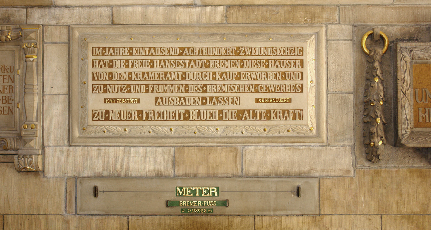 Gewerbehaus am Ansgarikirchhof 24 in Bremen (17. Jh.). Inschriften im Eingang